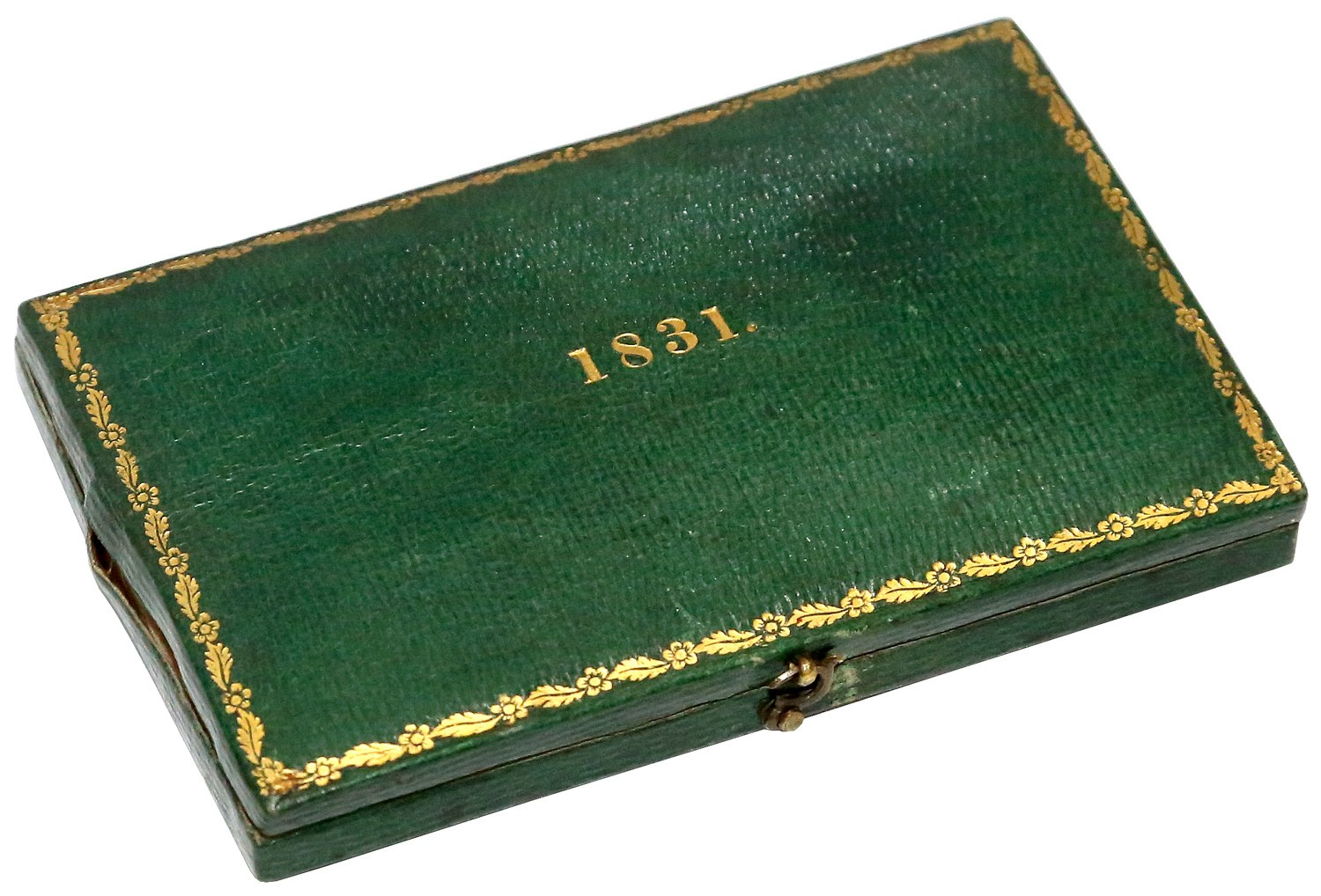 Pudełko na monety powstania listopadowego zielone